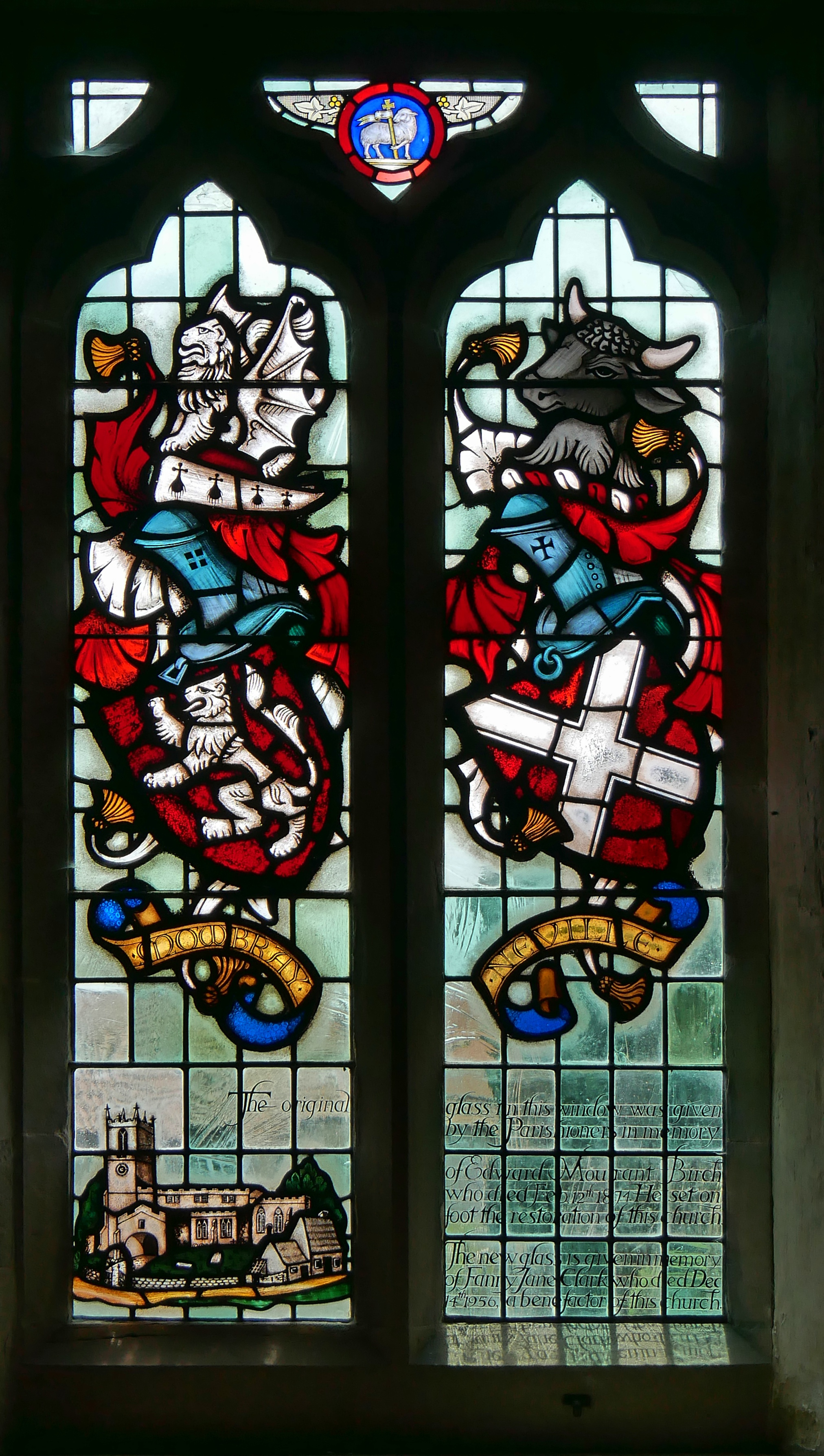 All Saints church, Kirkbymoorside - stained glass window